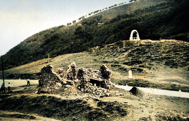 Ruinas de la capilla de San Salvador de Ibañeta hacia 1934 con el monumento a Roldán, al fondo, elaborado por Victoriano Juaristi